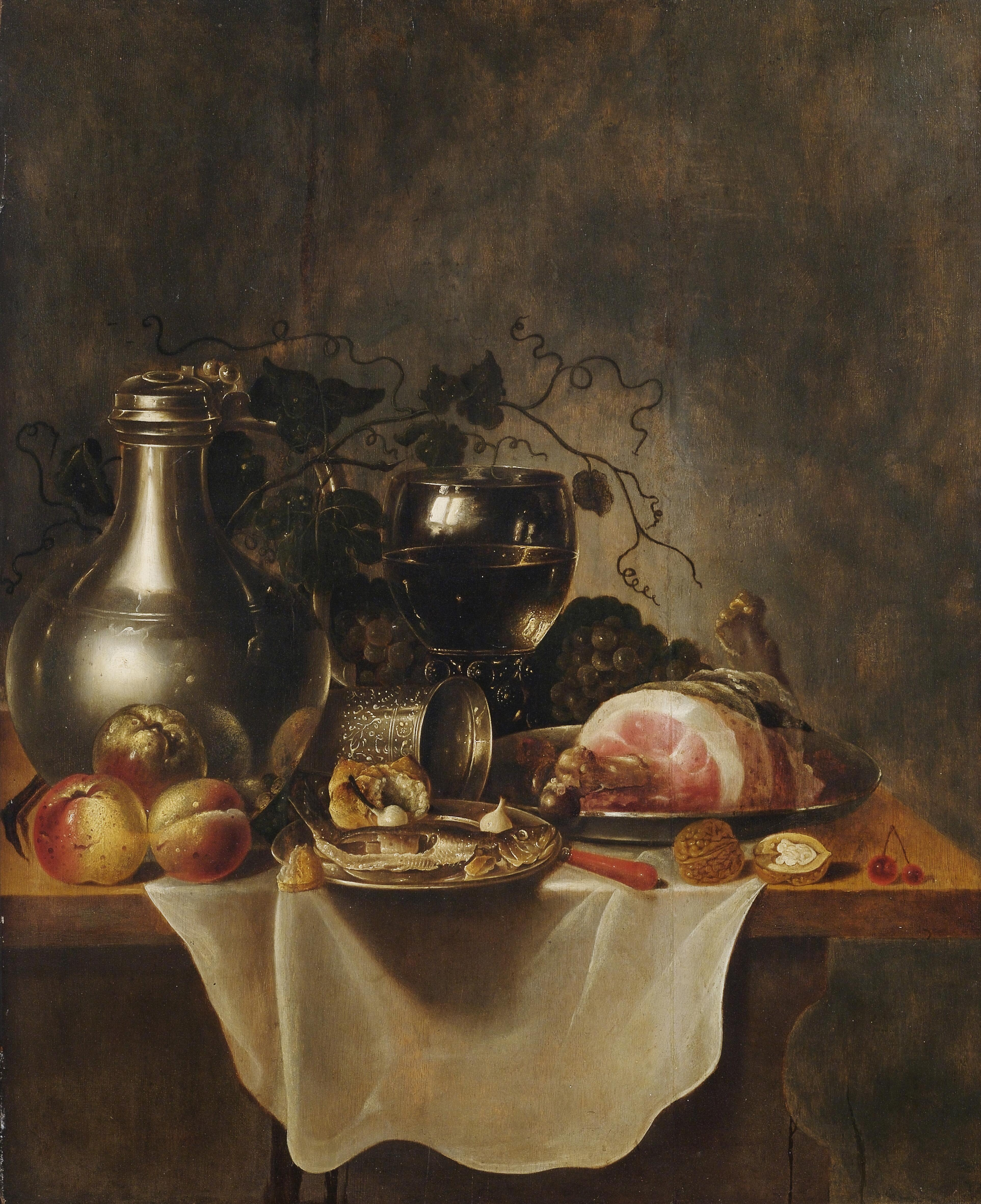 Naturaleza muerta con jarra de peltre, copa roemer y jamón, óleo sobre tabla, 98 x 78 cm, Madrid, Soraya Cartategui, procedente de colección privada alemana, subastado en Nagel Auktionen (Stuttgart) en 2011. Ficha RKD como anónimo de Haarlem c. 1650